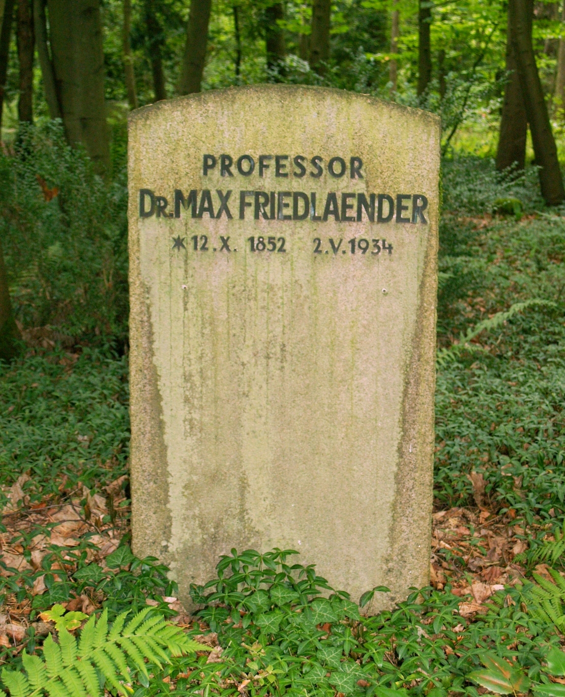 Grab von Max Friedländer auf dem Südwestfriedhof Stahnsdorf